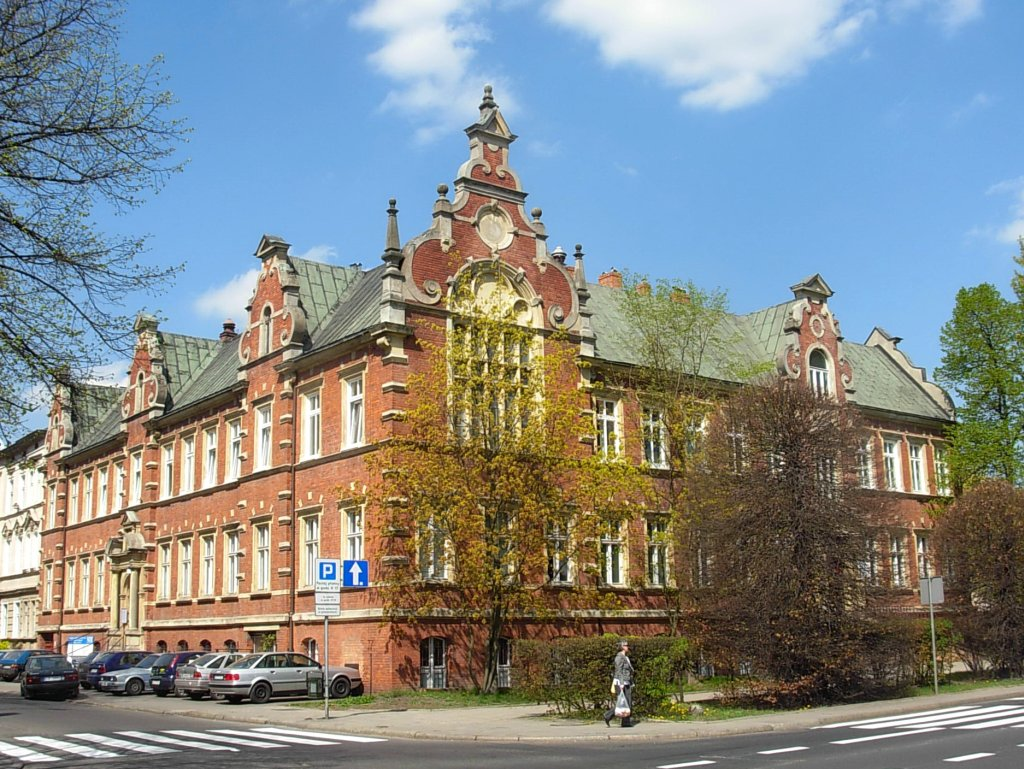 Budynek dawnego zakładu dla niewidomych w Bydgoszczy (Blindenheim), Carl Bergner 1899-1902